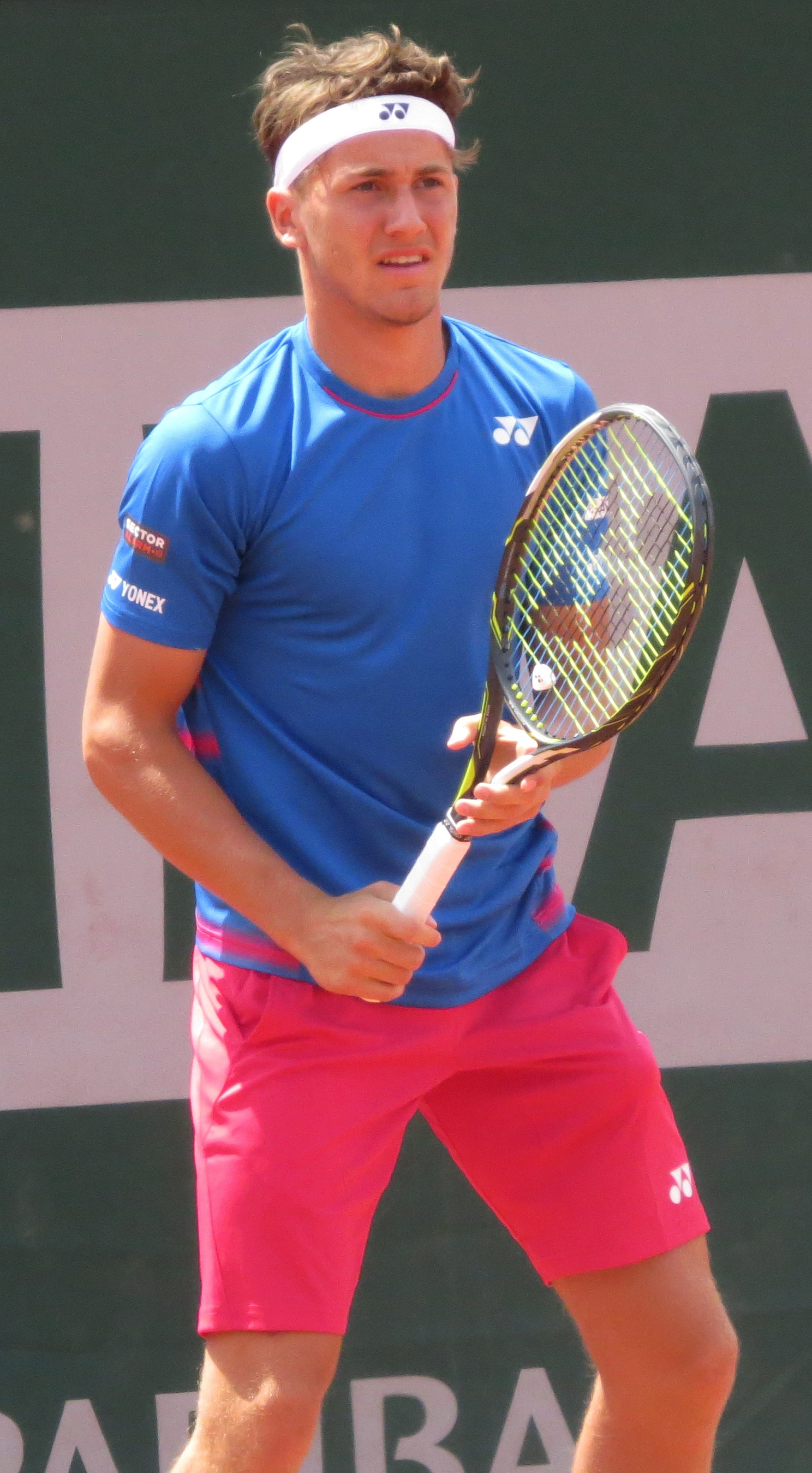 Casper Ruud lors de son deuxième tour des qualifications face à Maxime Janvier (court n°6)